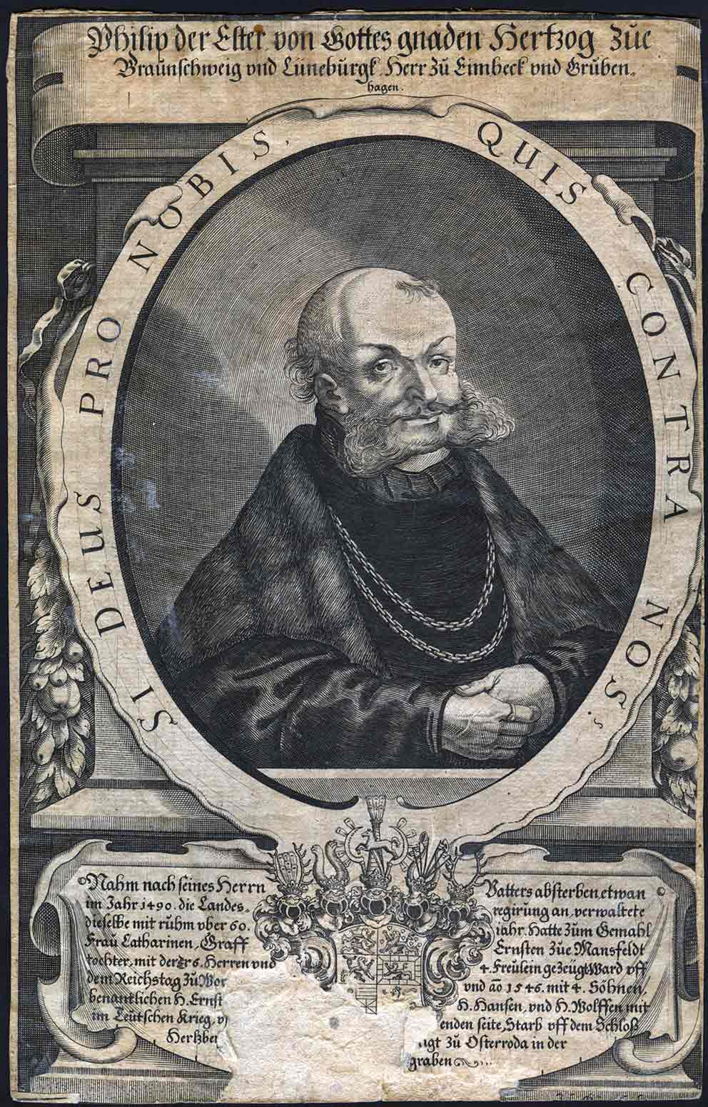 1 grafiskt blad, kopparstick